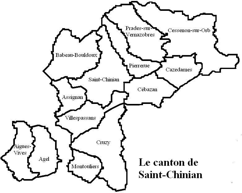 Le canton de Saint-Chinian Image personnelle